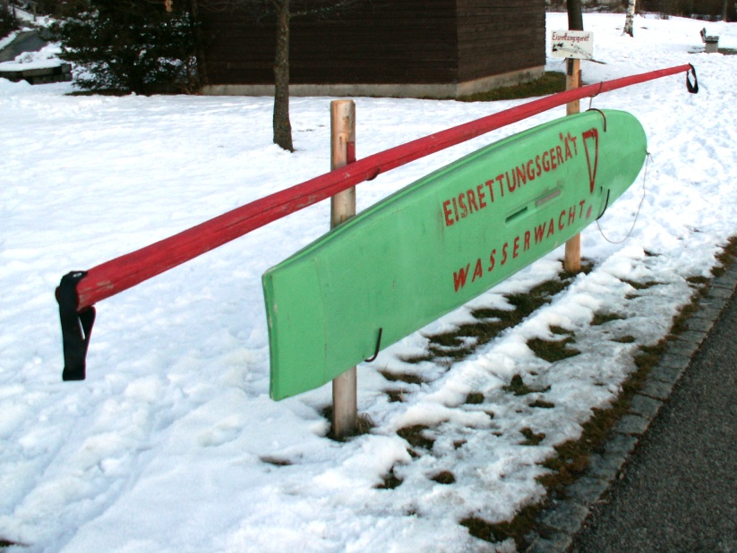 Ice rescue